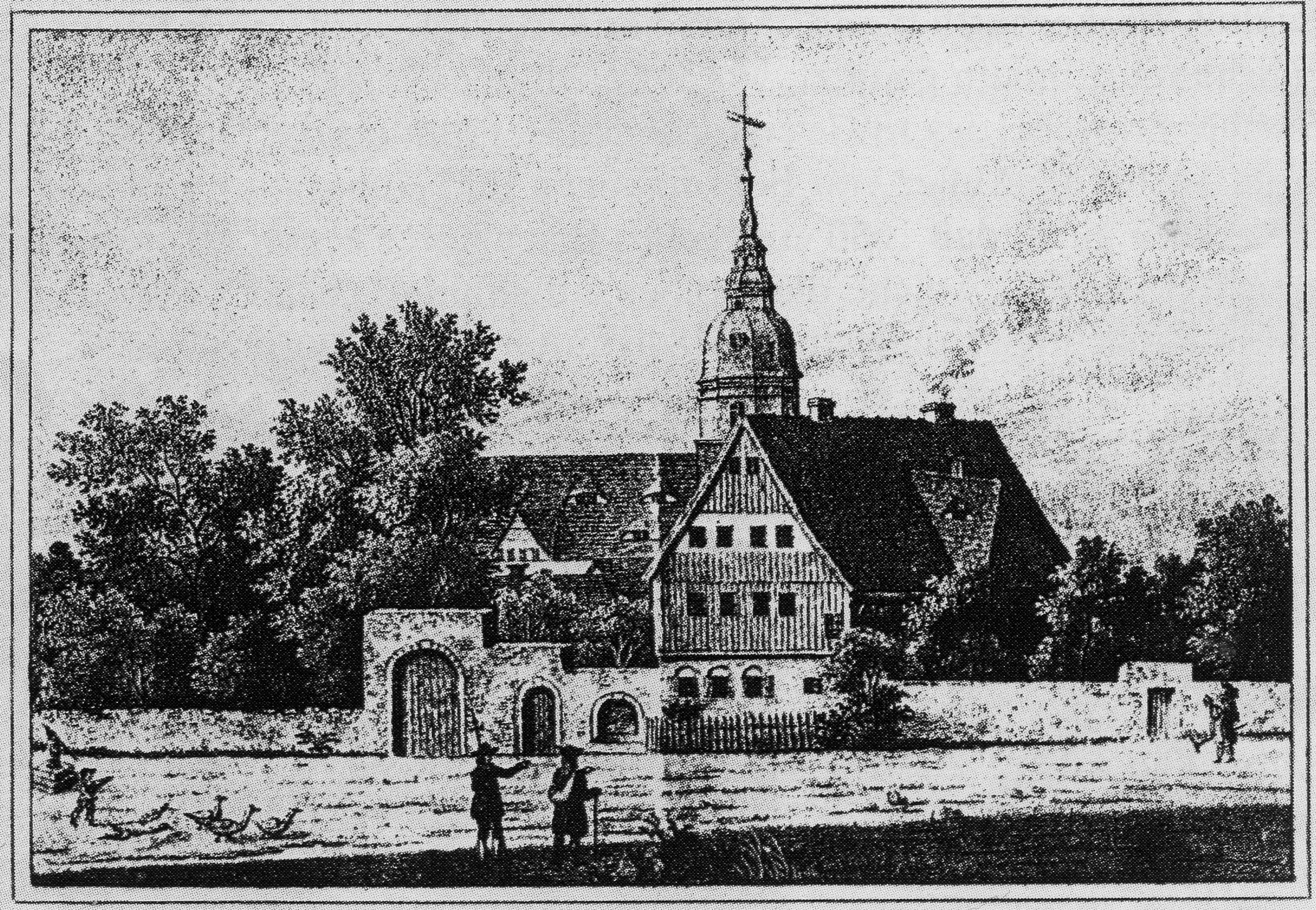 Radebeul, Pfarrhaus der Friedenskirche, Litho um 1800